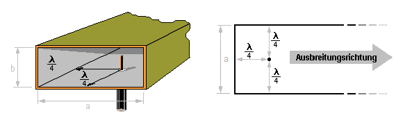 Antenne Interferenz Welle Ausbreitungsrichtung